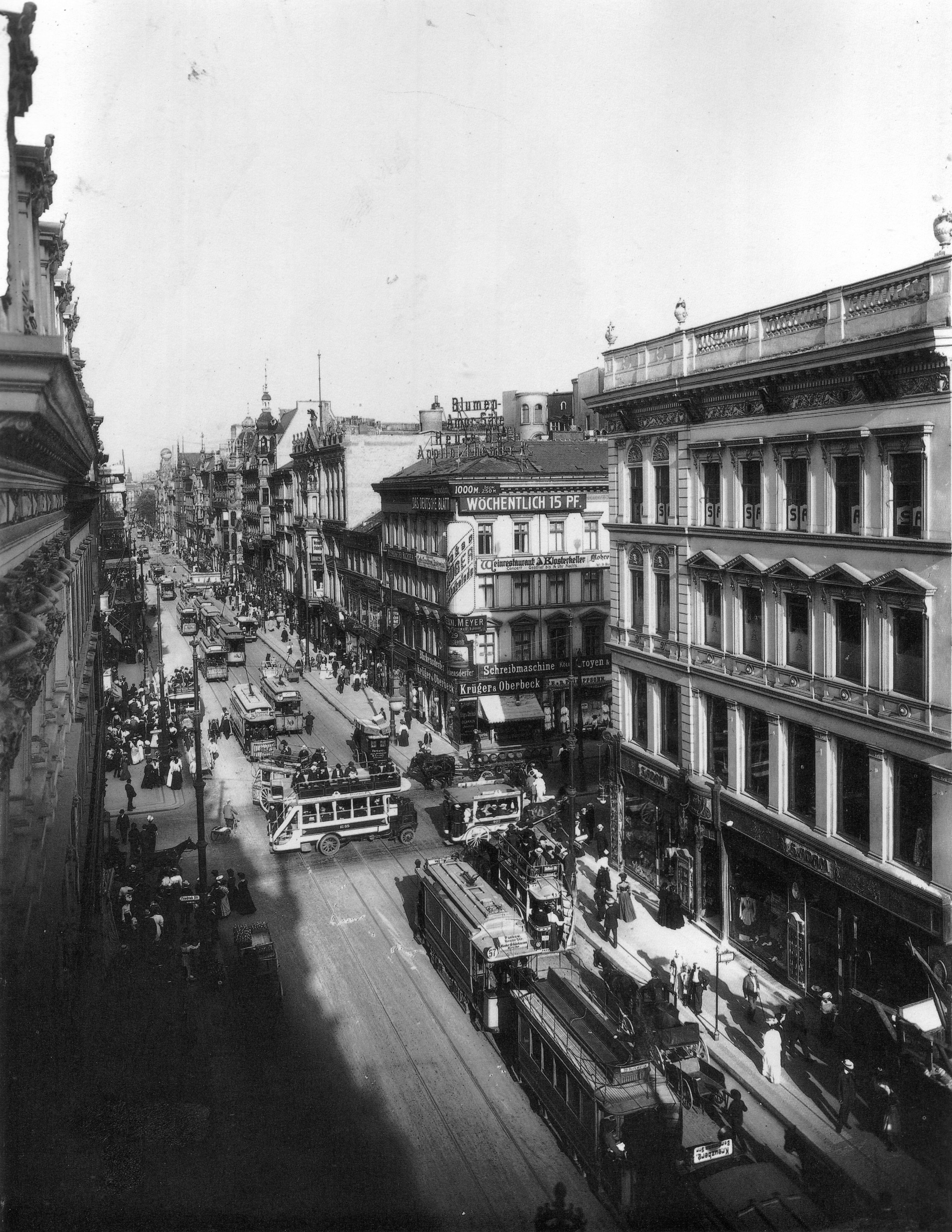 Berlin. Leipziger Straße Ecke Friedrichstraße ostwärts.Ergänzung: Das Gebäude im Vordergrund (rechte Seite) ist das ehemalige Lager der WMF (Württembergische Metallwarenfabrik), das später abgerissen wurde.[1]